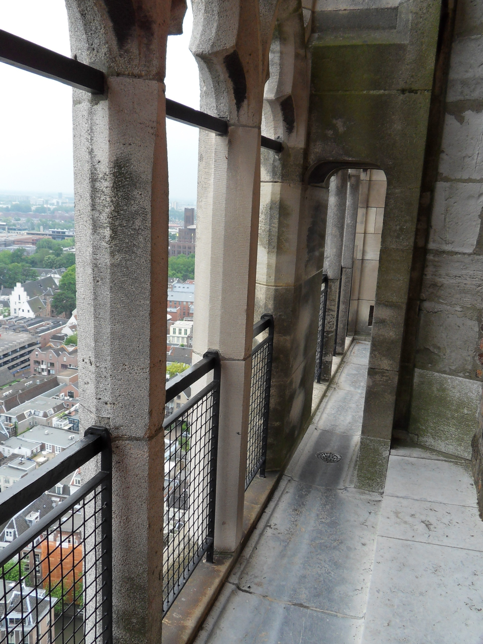 Een balkon van de Domtoren.